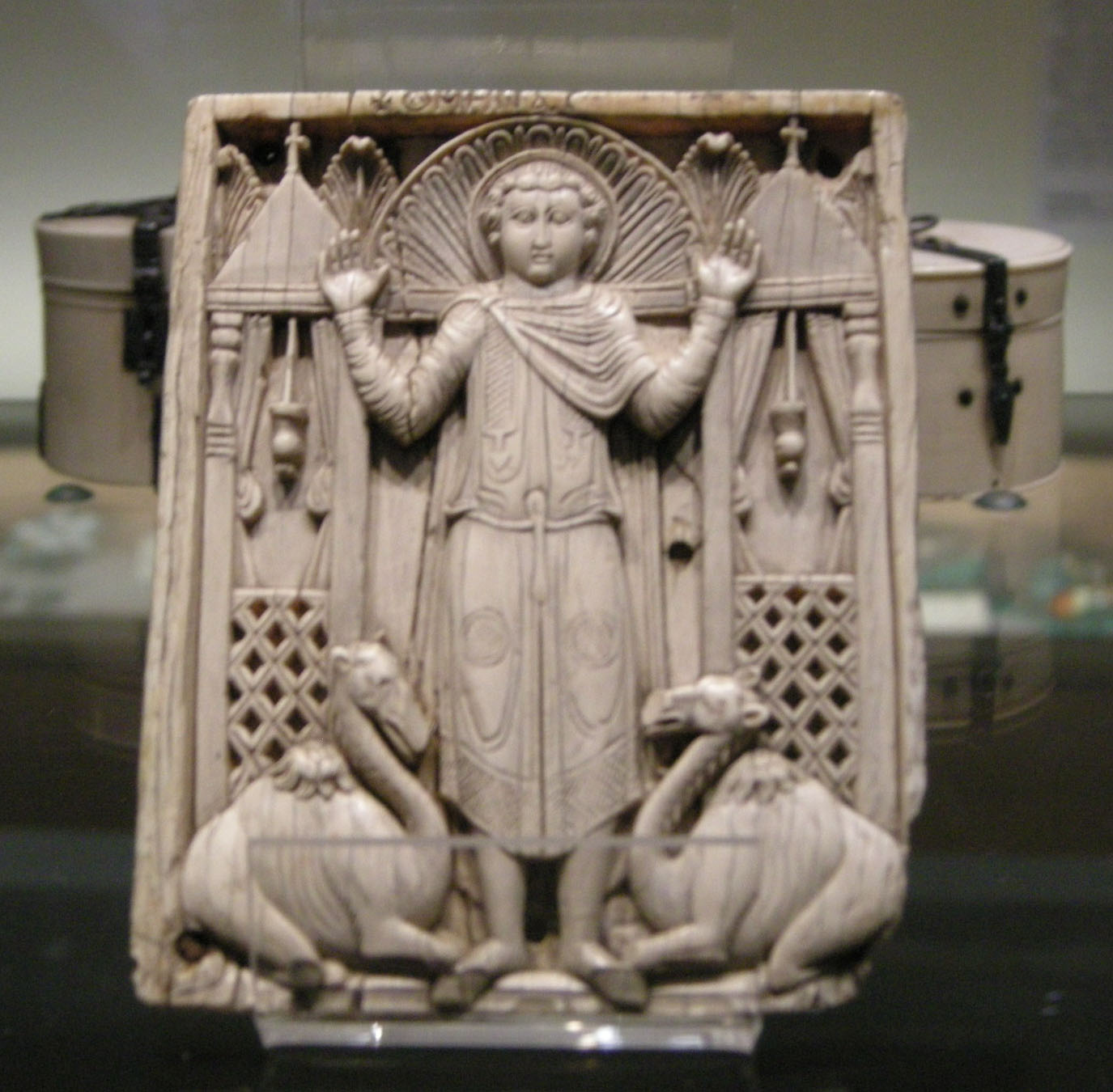 Tavoletta paleocristiana con san Mena, da Alessandria d'Egitto. Raccolte d'arte applicate del Castello Sforzesco di Milano.